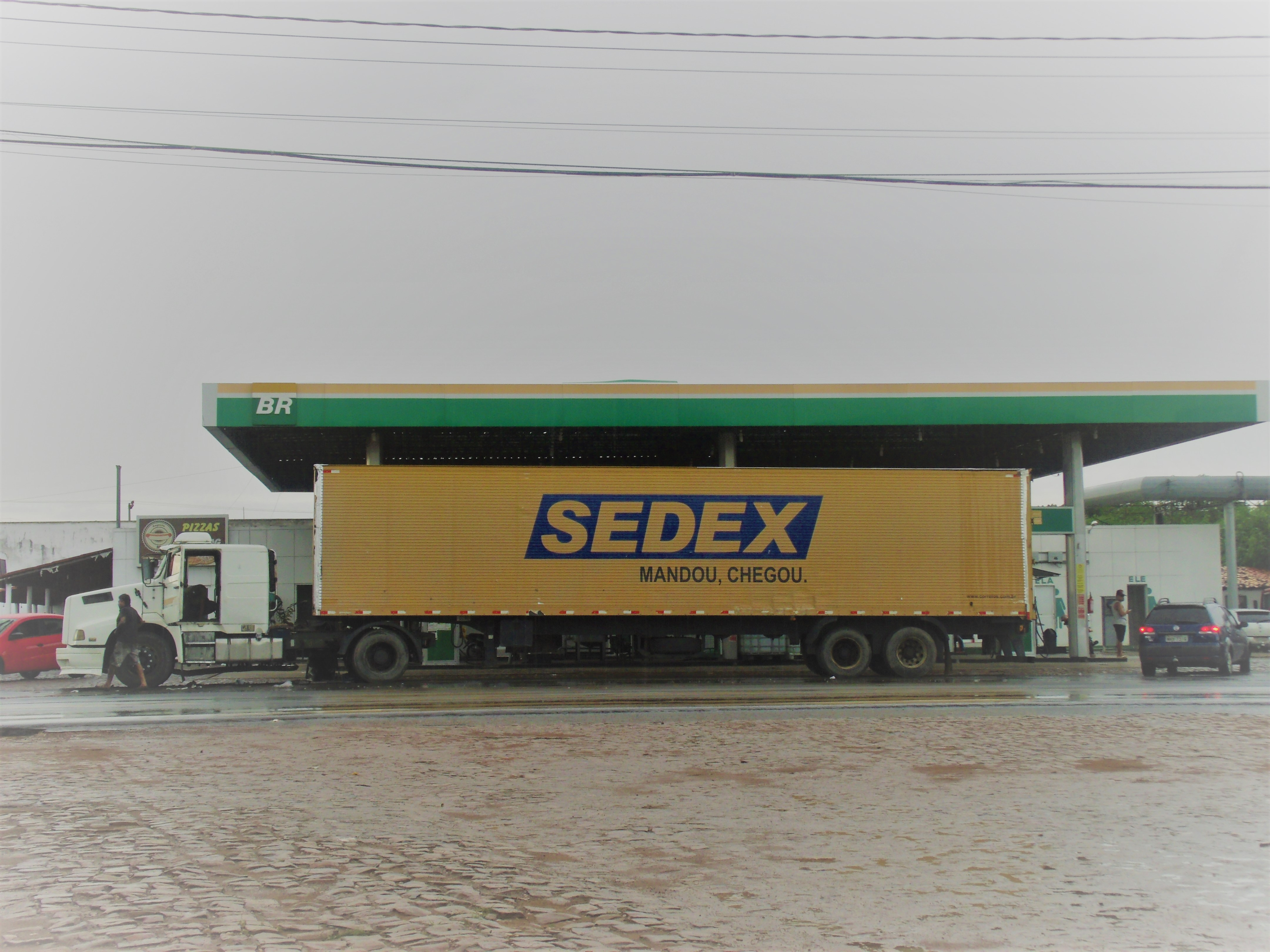 Carreta, marca Volvo, do Sedex do Correio do Brasil.